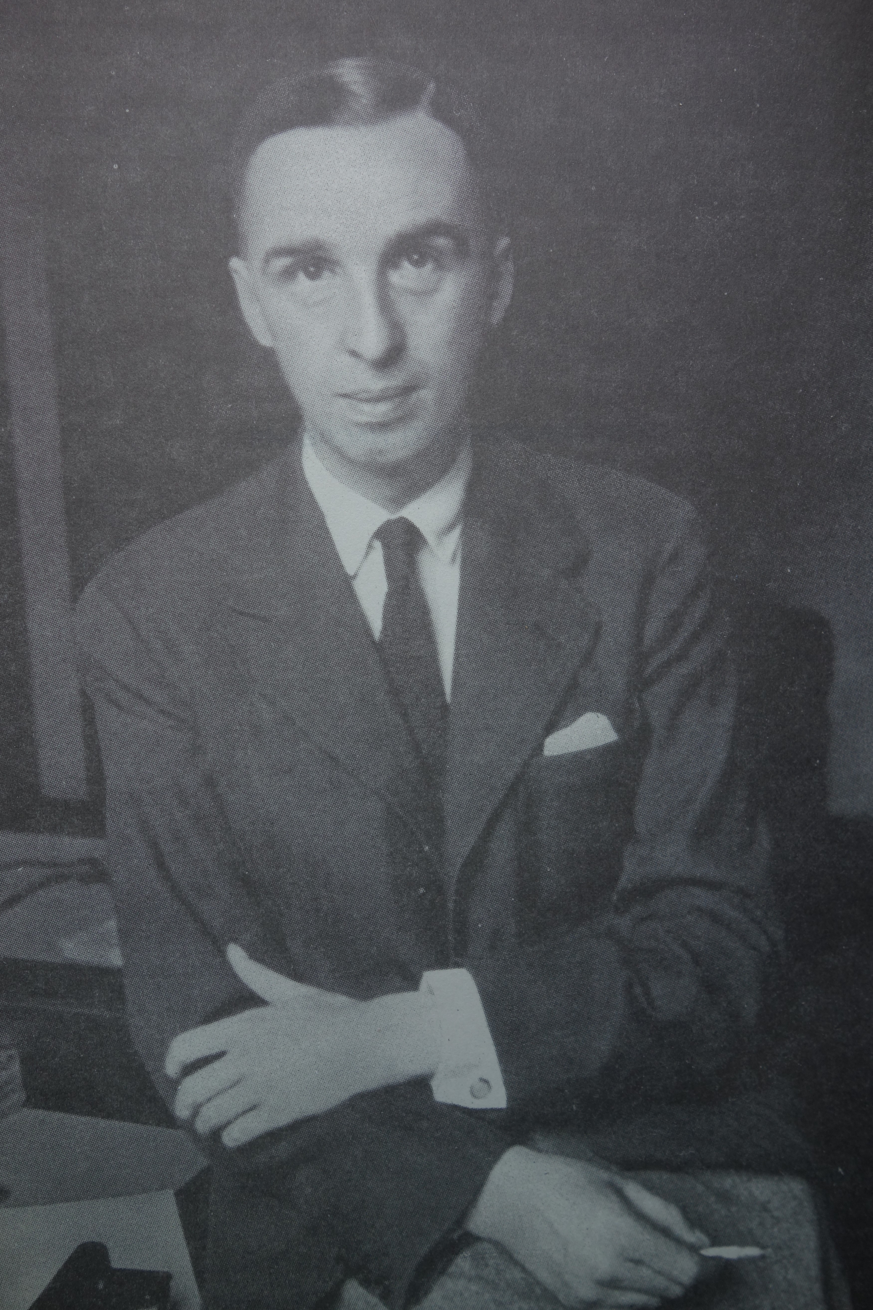 Georgij Ivanov Foto um 1934